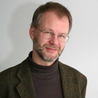 Foto Prof. Dr. Jörn Loviscach